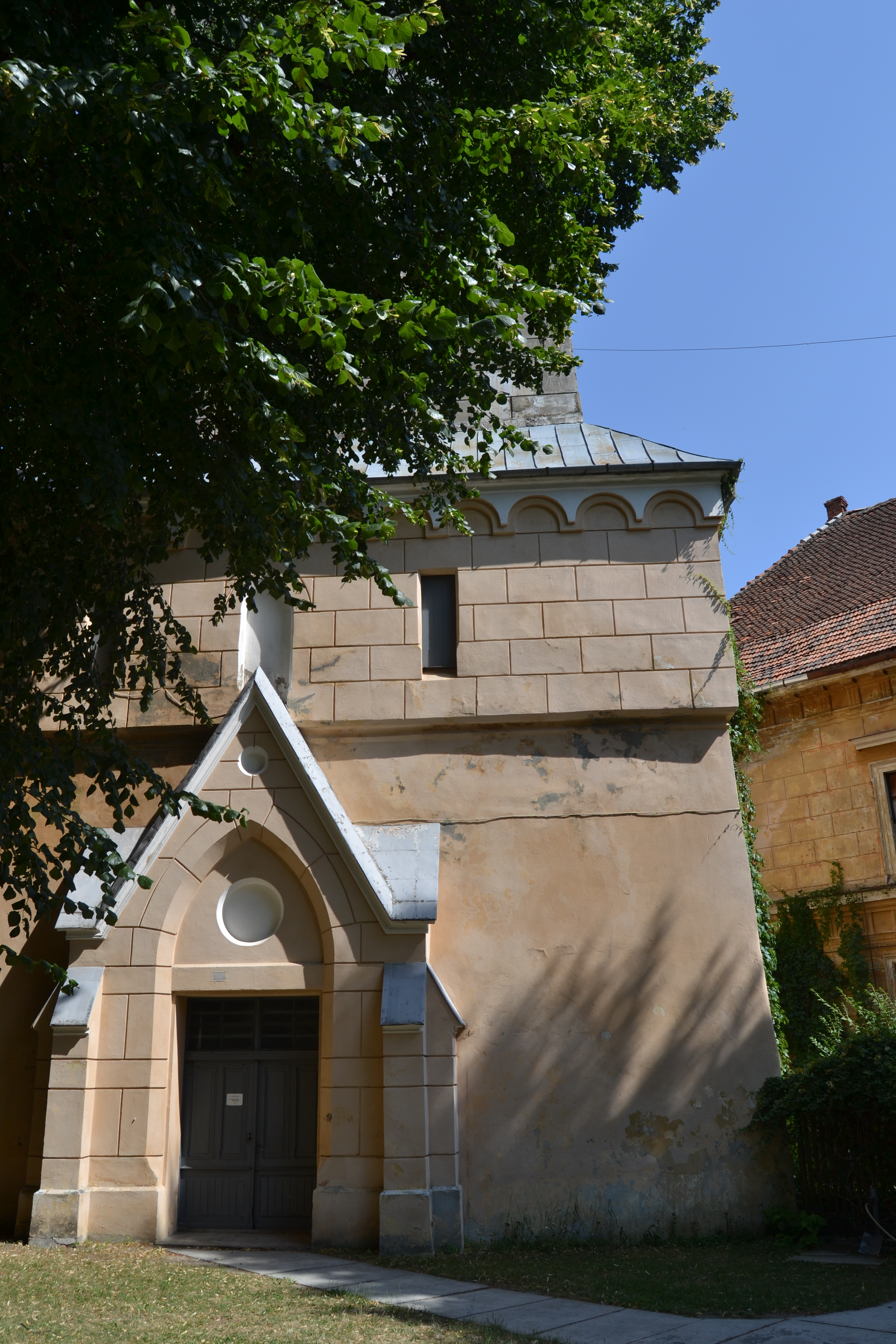 Biserica evanghelică 01